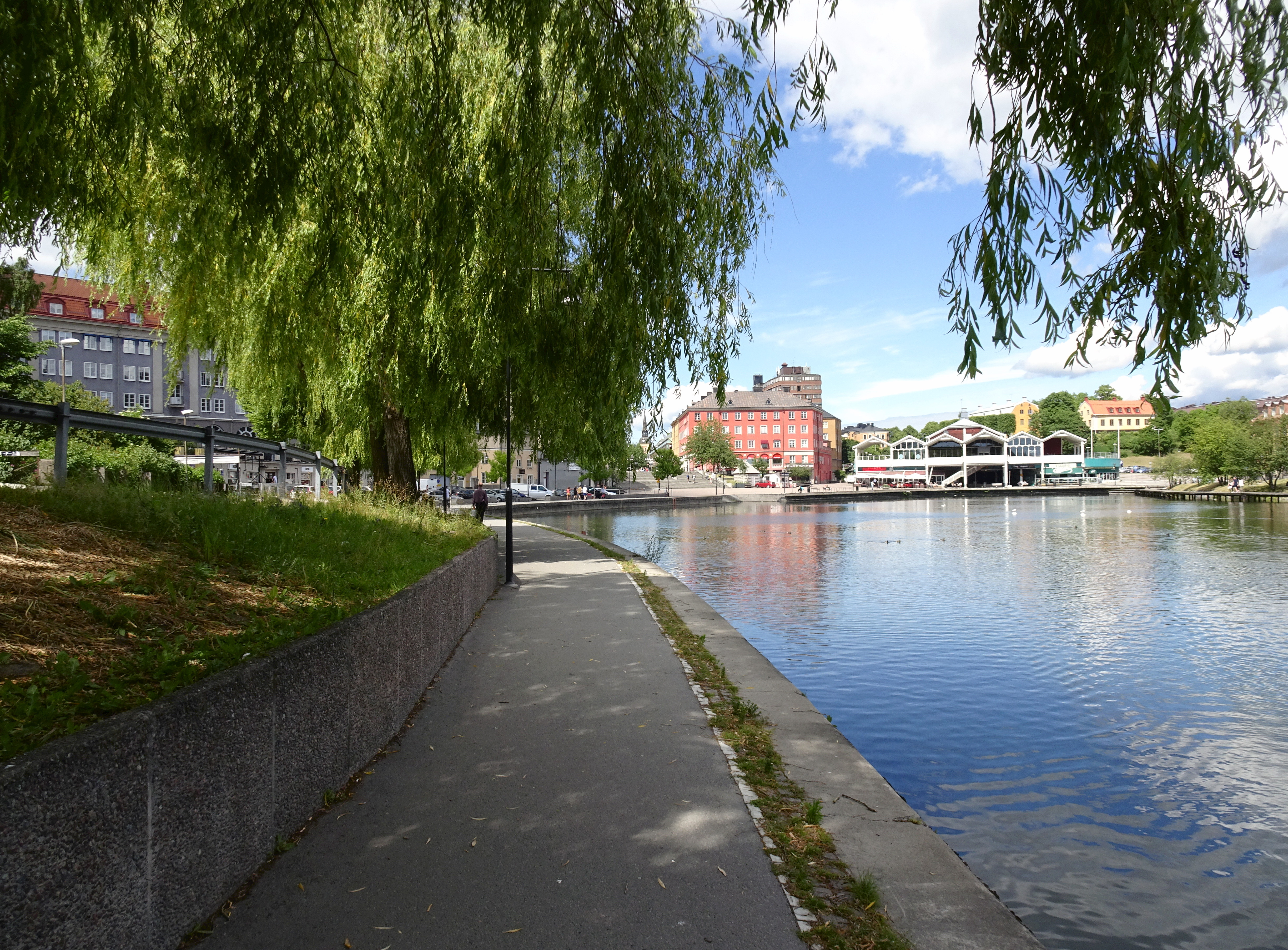 Strandgatan, Södertälje, mot norr